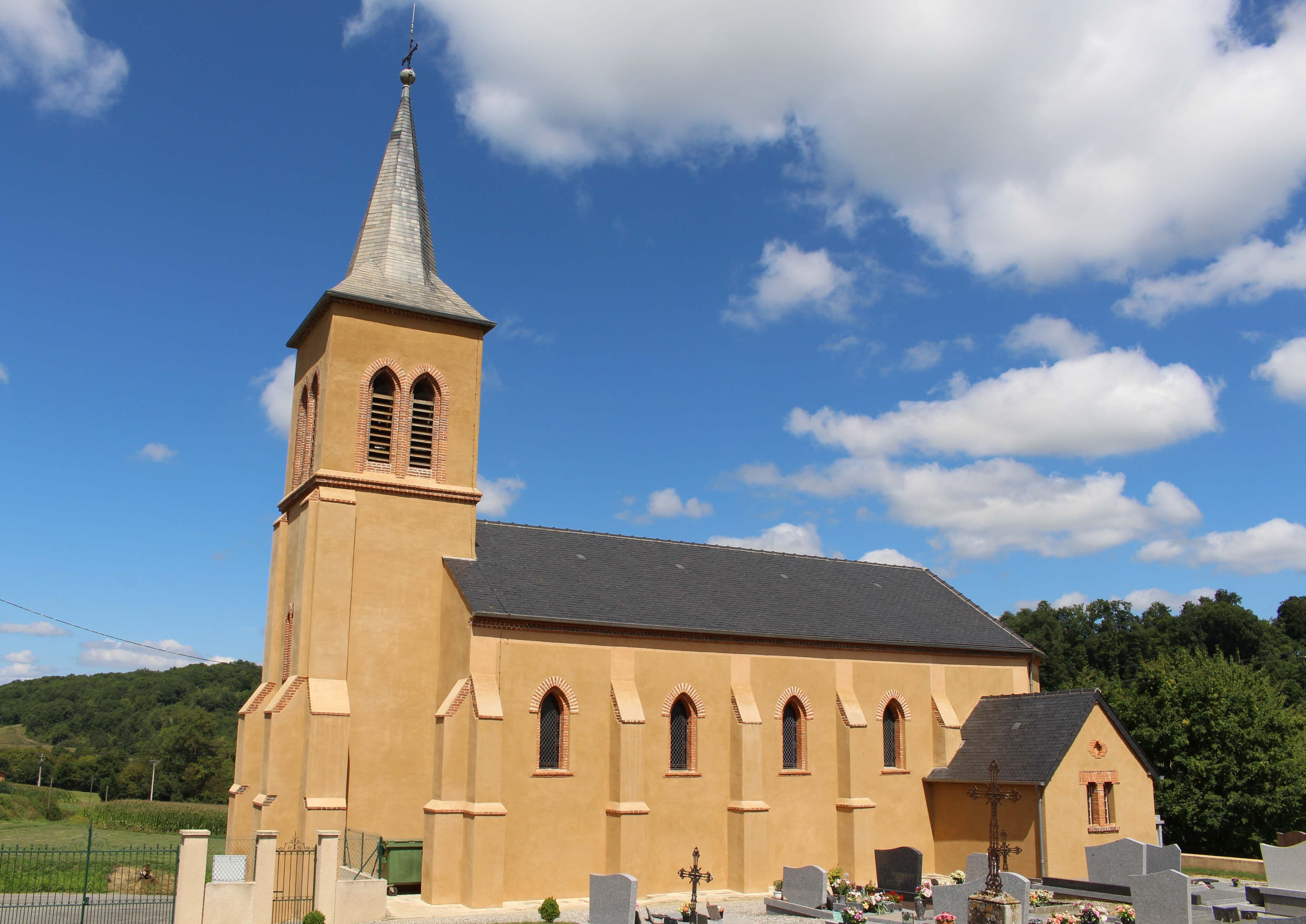 Église Saint-Michel de Fréchède (Hautes-Pyrénées)